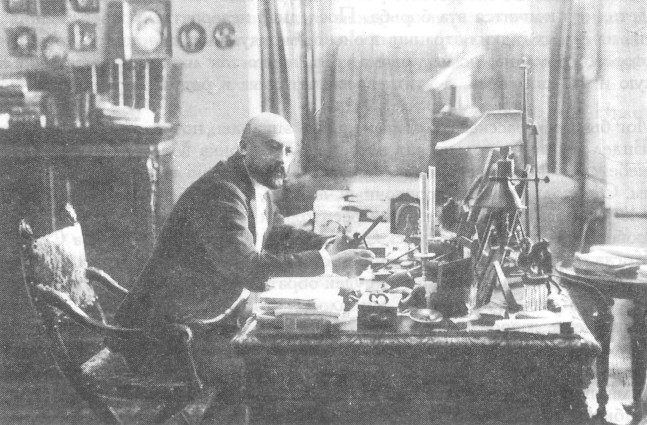 Николай Михайлович в своём кабинете в Ново-Михайловском дворце, Санкт-Петербург, Россия.